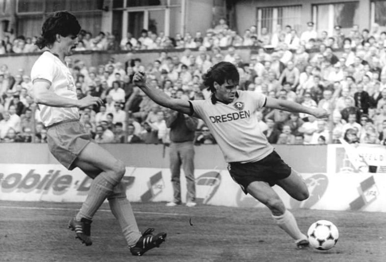 ADN-ZB-Häßler- -13.5.88-mx-Dresden: Fußball-Oberliga- Dynamo Dresden - FC Union Berlin (0:0)- In der veregangenen Partie erreichte der stark abstieggefährdete 1. FC Union bei Dynamo Dresden vor 10.000 Zuschauern ein torloses Remis. Ulf Kirsten (r.-Dresden) im Duell mit dem Berliner Matthias Morack.